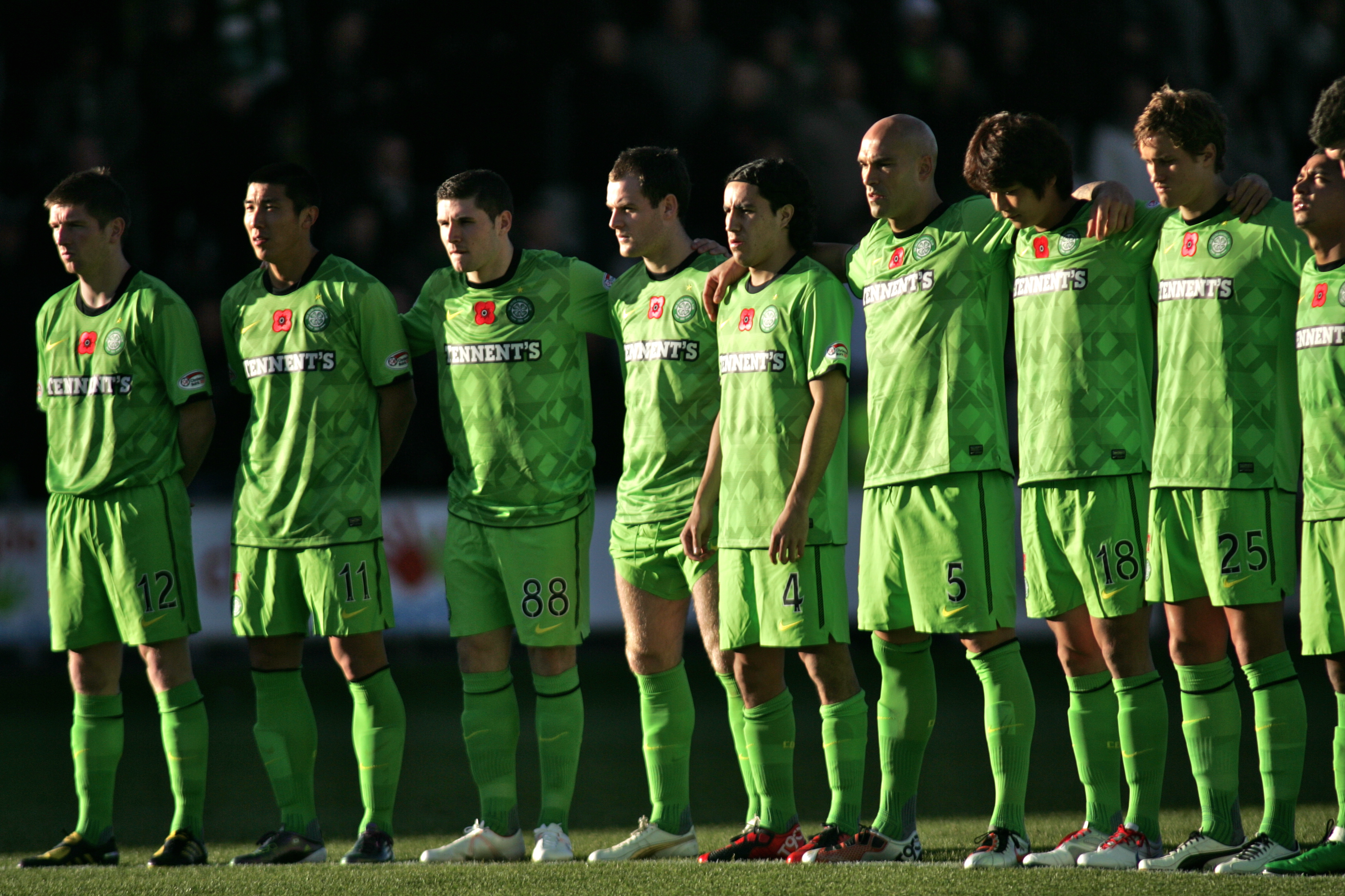 HI7Y0060